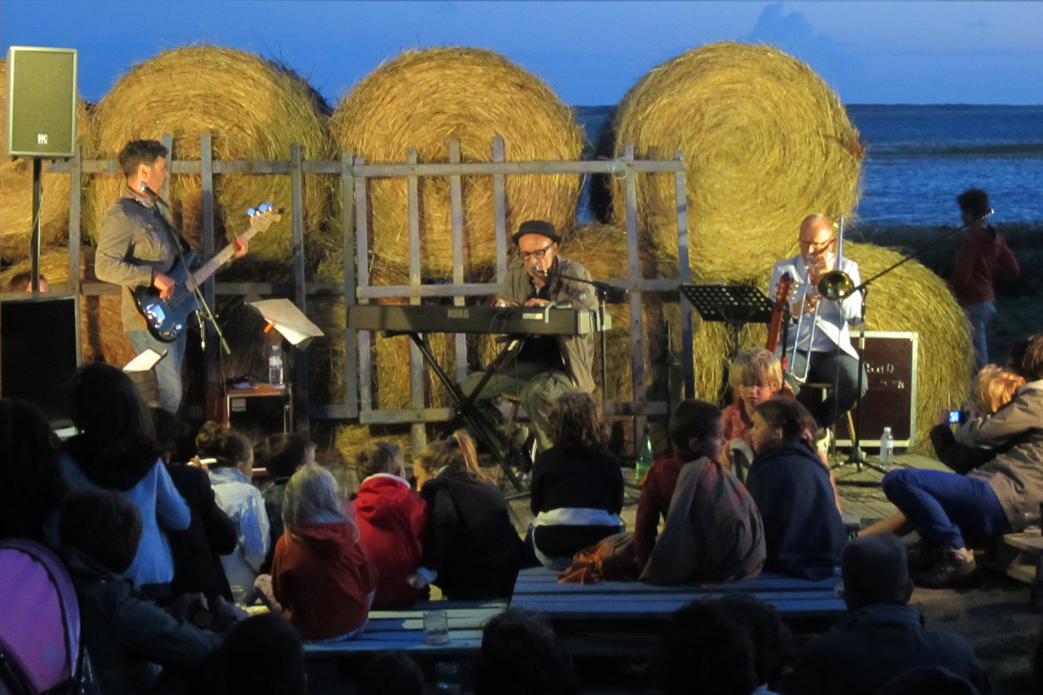 Bill Pritchard lors d'un concert organisé par "Un soir dans la Manche" à Saint-Germain-sur-Ay, Manche